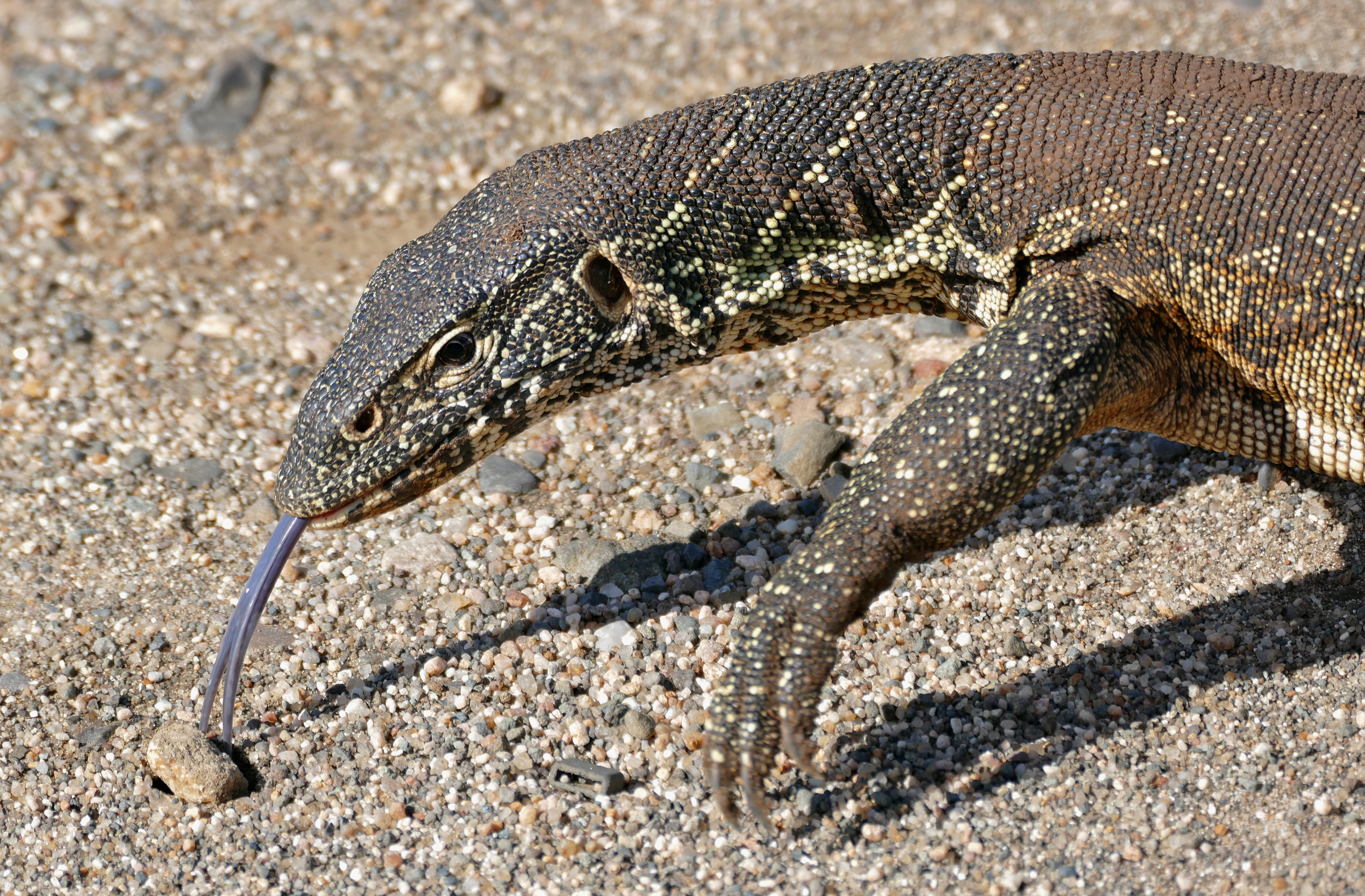 Sunset Dam, Lower Sabie, Kruger NP, SOUTH AFRICA